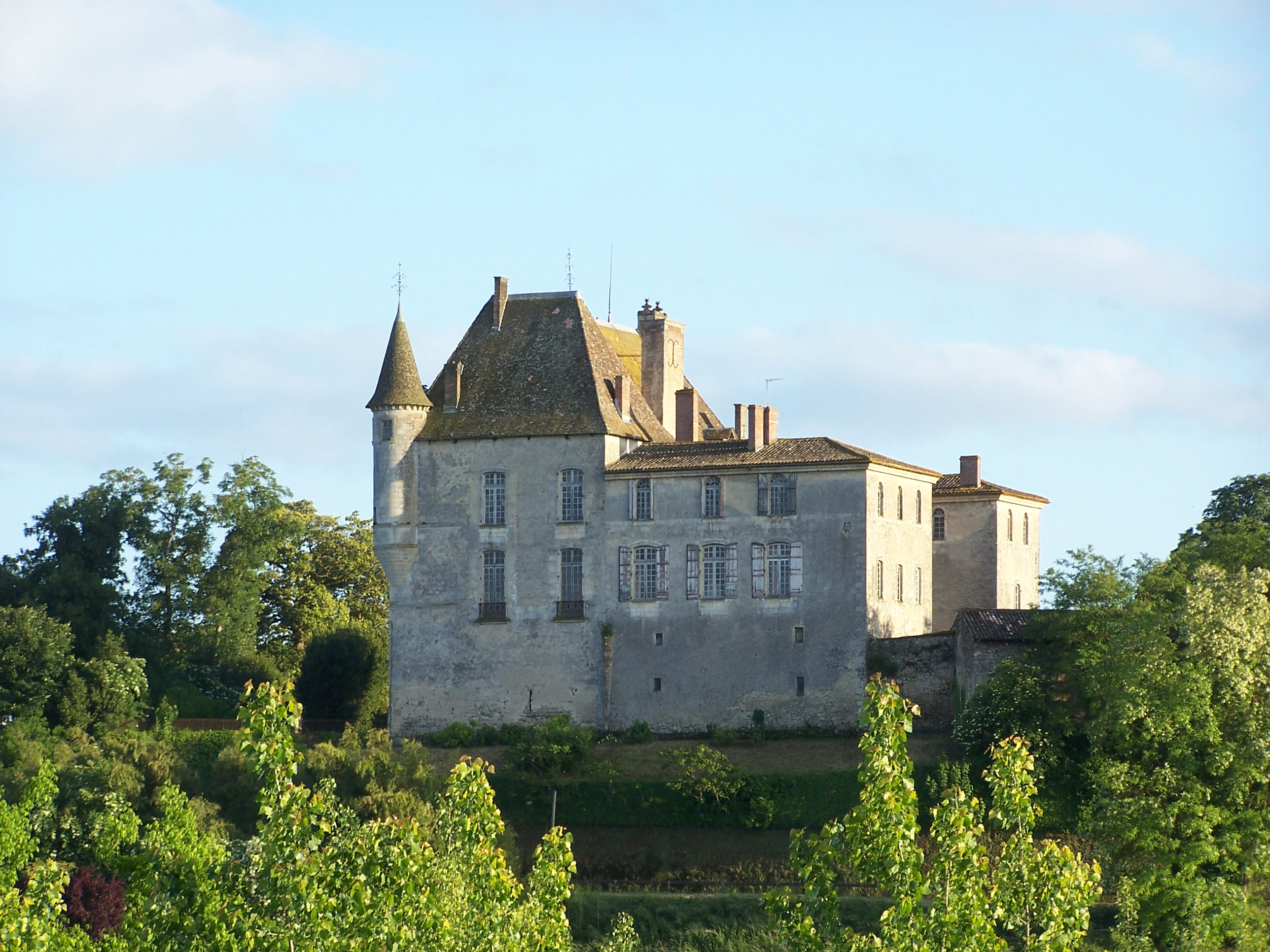 Château de Castets-en-Dorthe, Gironde, France